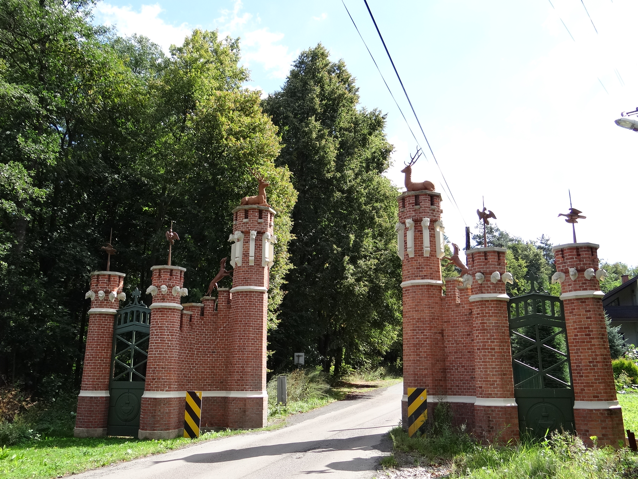 Tenczynek, Brama Zwierzyniecka (pozostałość ogrodzenia zwierzyńca), 2 poł. XIX